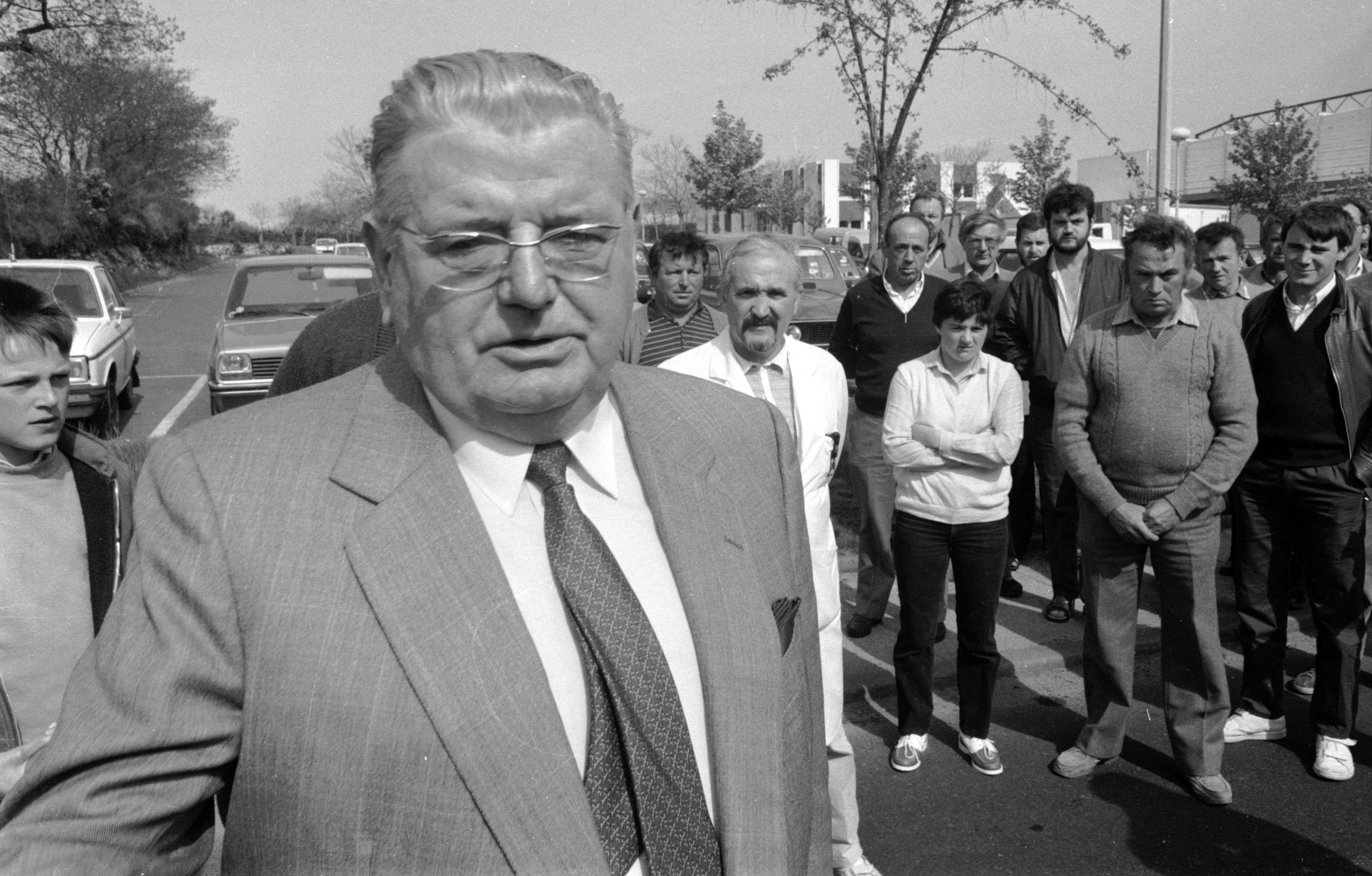 Le chef d'entreprise français Jean-Baptiste Doumeng en 1983 à Guerlesquin (Bretagne, France).